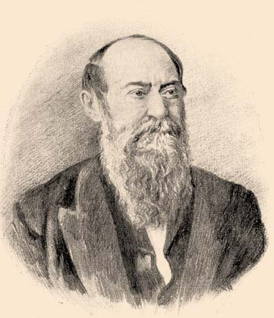 Pesty Frigyes történész, országgyűlési képviselő, a Magyar Tudományos Akadémia rendes tagja.